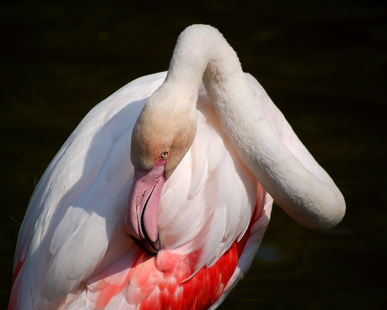 Foto van een Flamingo in Blijdorp